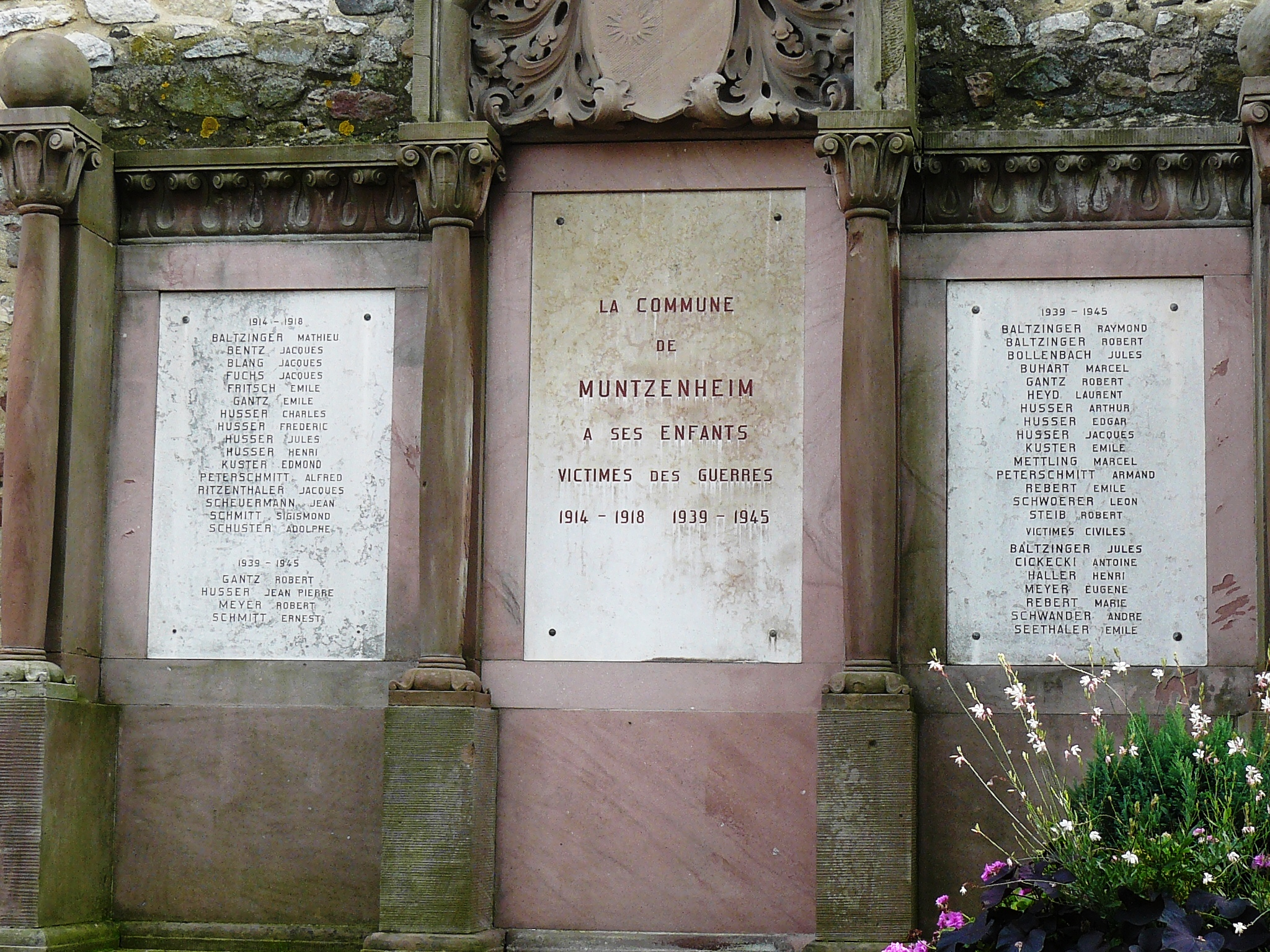 Monument aux morts de Muntzenheim